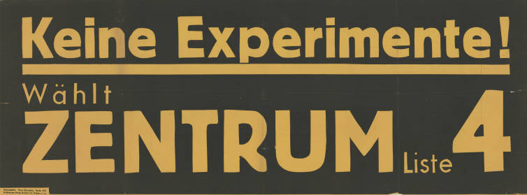 Keine Experimente! Wählt Zentrum Liste 4 Plakatart: Textplakat Allgemein Auftraggeber: Herausgeber: Theo Hieronimi, Berlin NW Drucker_Druckart_Druckort: Hollhauser-Druck, Berlin C 19 Objekt-Signatur: 10-043 : 6 Bestand: Plakatsammlung Weimarer Republik/NS-Zeit (10-043) GliederungBestand10-18: Zentrum Lizenz: KAS/ACDP 10-043 : 6 CC-BY-SA 3.0 DE